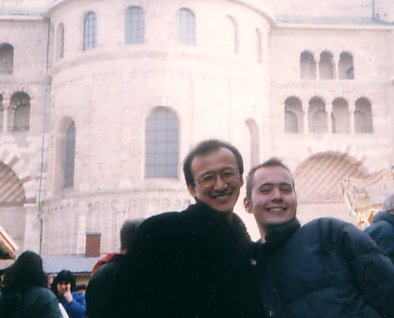 Aufnahme vom 1. und 2. Vorsitzenden (Erlaubnis eingeholt für Veröffentlichung) der aas